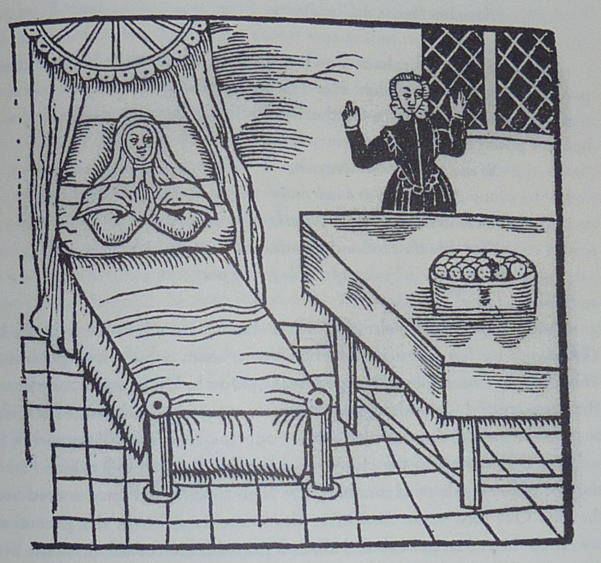 Kindbett nach Beschimpfung der Bettlerin, Illustration zu Lamenting Lady, zurückgehend auf die Legende von Margarete von Henneberg